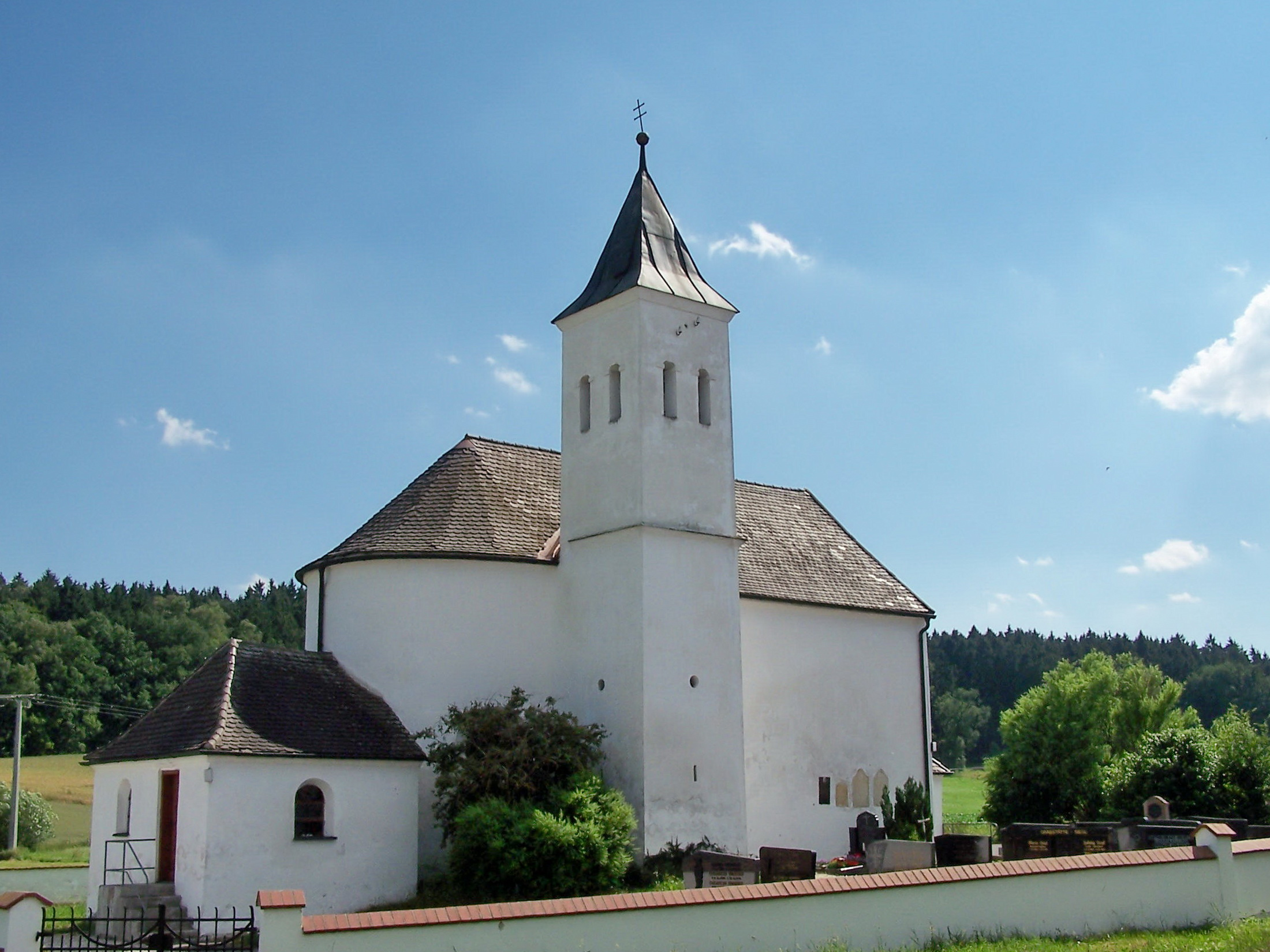 Hohenthann, Unkofen. Kirche St. Nikolaus. Barocker Bau aus der 1. Hälfte 18. Jahrhundert über spätromanischer Anlage; mit Ausstattung.